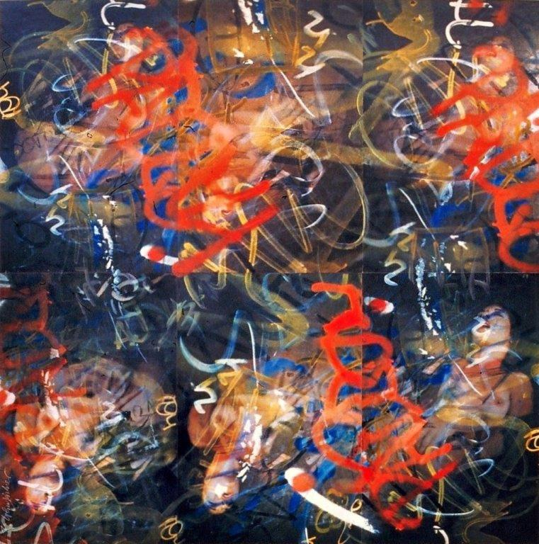 'Maitresse de soi' 121x117cm Ankauf Sammlung NRW, Kornelimünster, Copyright Rainer Weingärtner